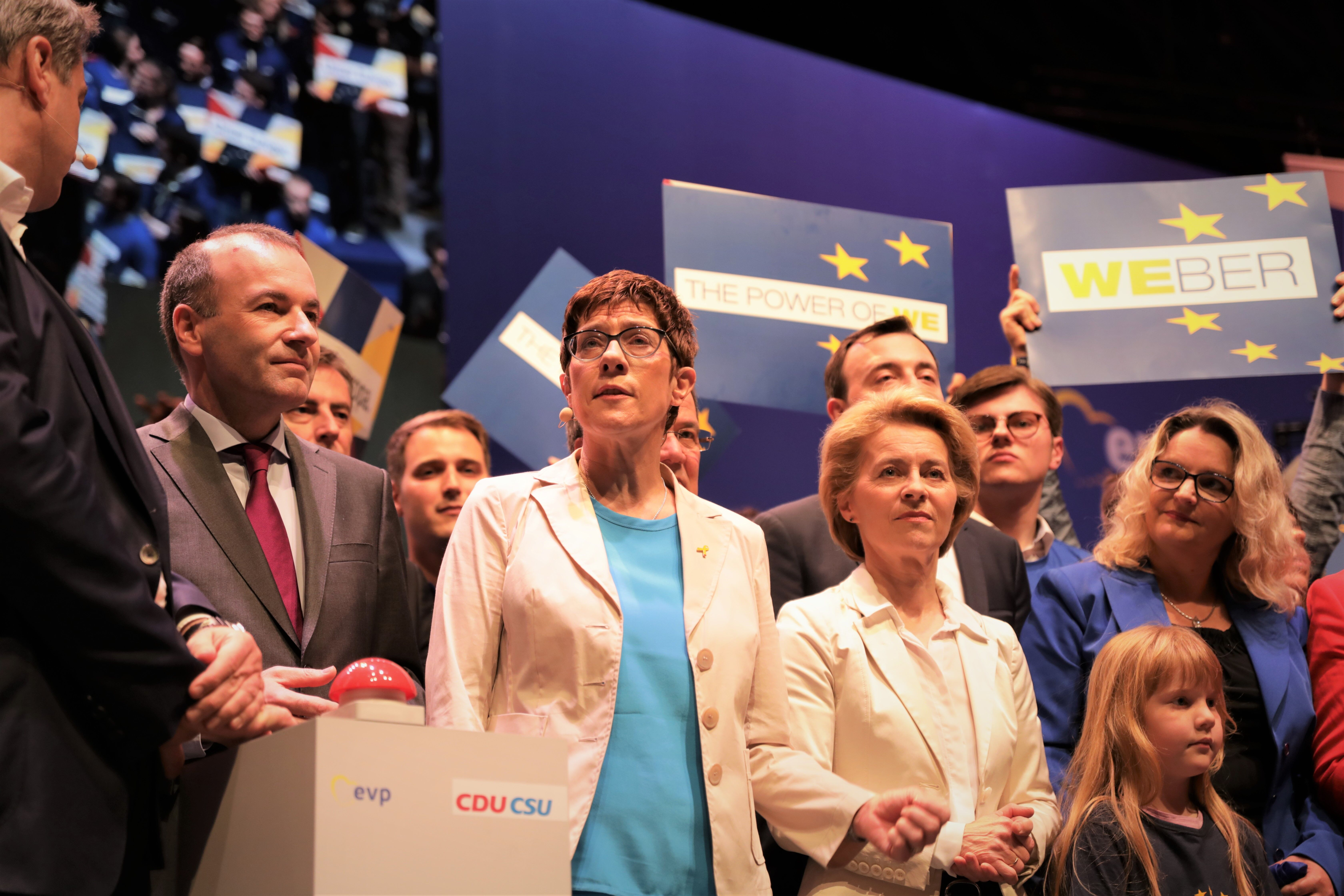 Manfred Weber, Annegret Kramp-Karrenbauer and Ursula von der Leyen